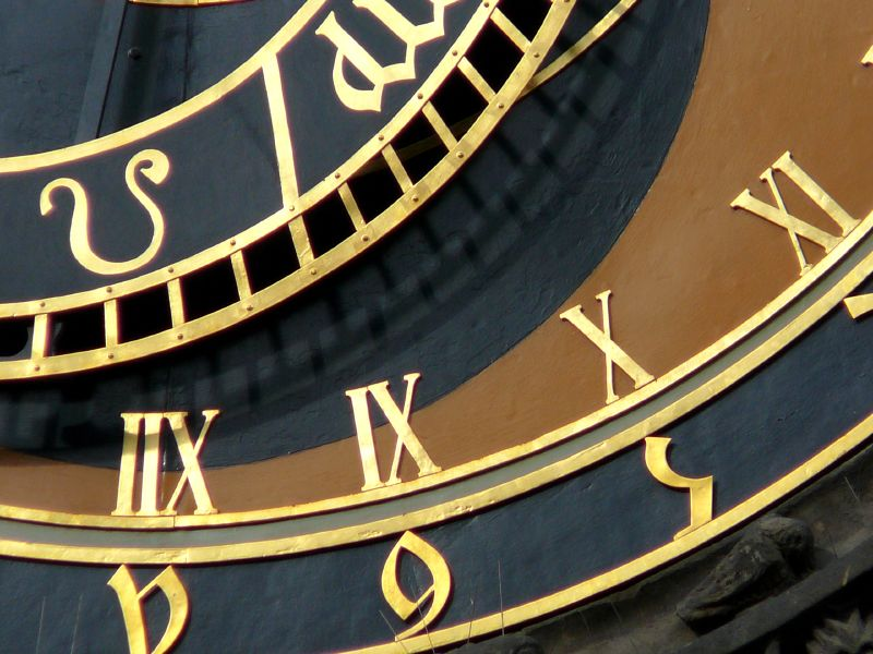 Výřez ze snímku z pražského orloje